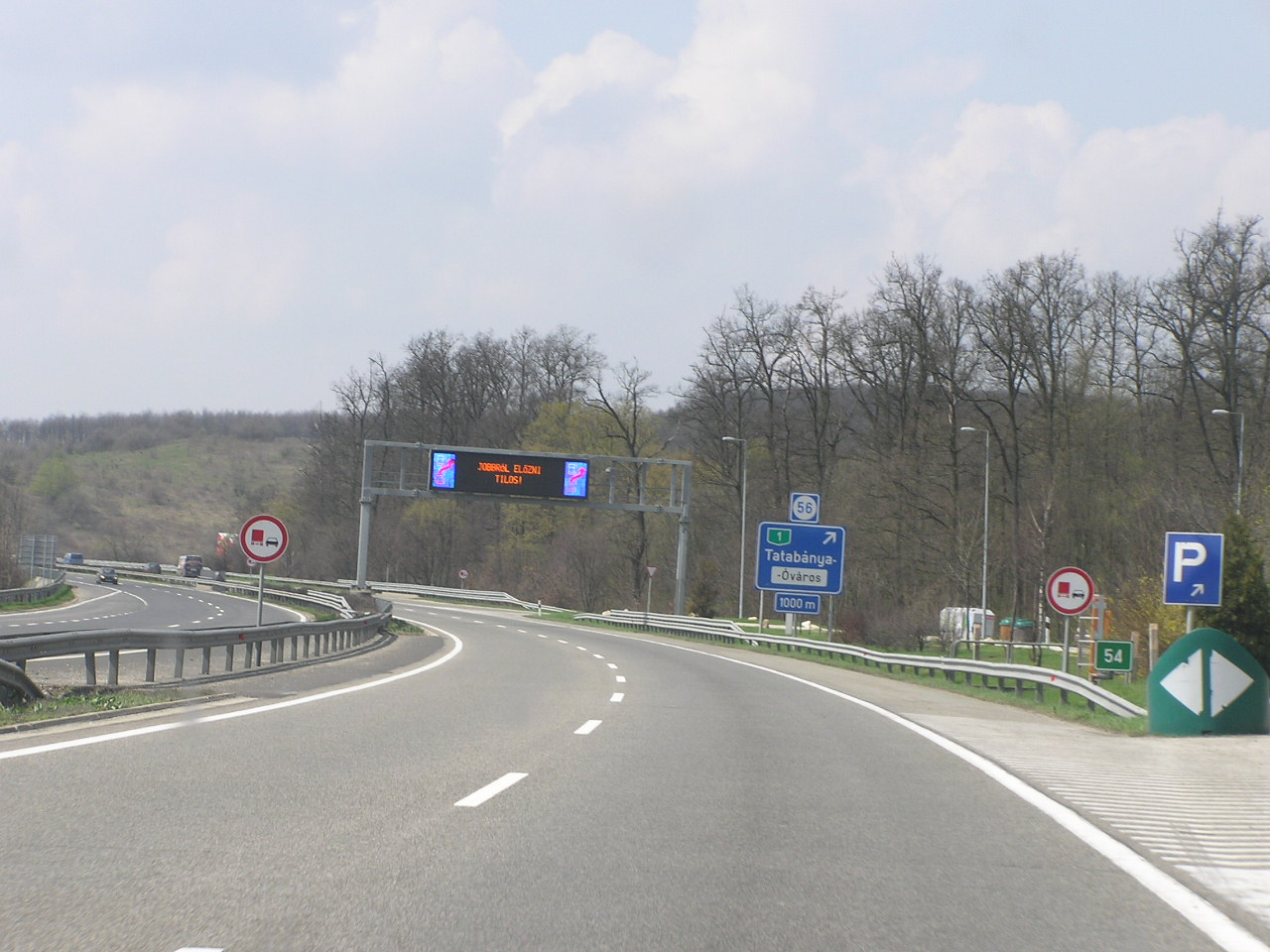 Parkplatz an der Autobahn M1 vor Tatabánya, von Budapest kommend.